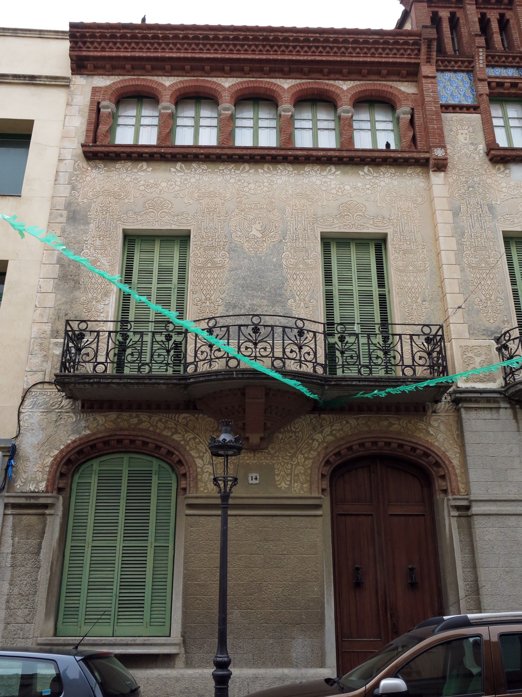 Can Floris (Canet de Mar)